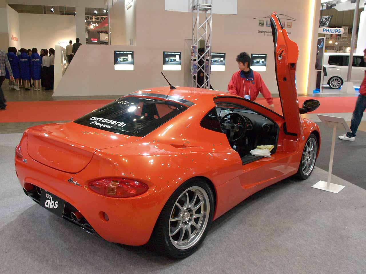 Rear of ASL Garaiya, at Tokyo Auto Salon 2008.